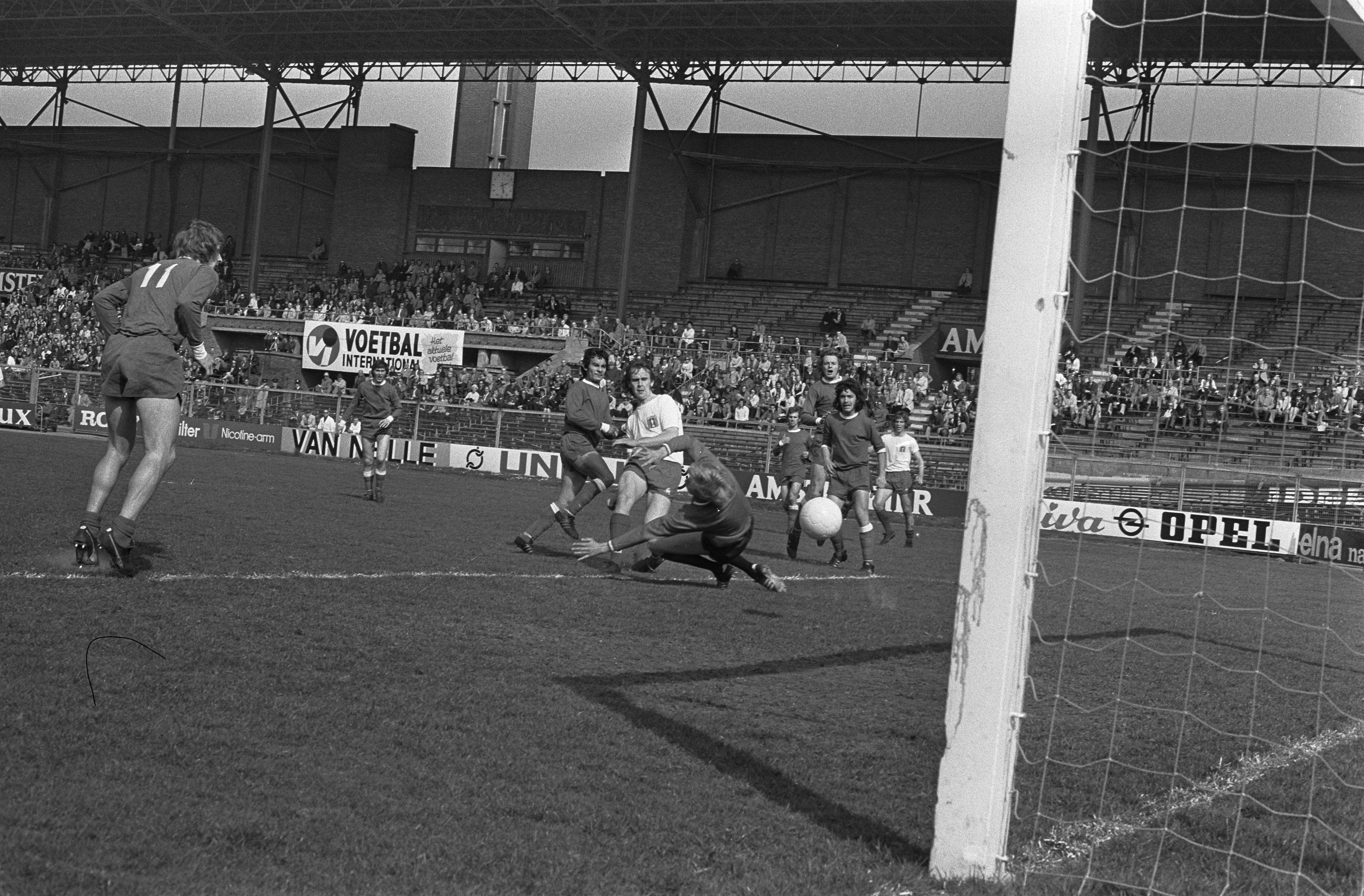 Collectie / Archief : Fotocollectie Anefo Reportage / Serie : [ onbekend ] Beschrijving : FC Amsterdam tegen NEC 5-0, Jaap Visser (2e van links) scoort, rechts Chris Dekker Datum : 31 maart 1974 Trefwoorden : sport, voetbal Instellingsnaam : FC Amsterdam Fotograaf : Punt, […] / Anefo Auteursrechthebbende : Nationaal Archief Materiaalsoort : Negatief (zwart/wit) Nummer archiefinventaris : bekijk toegang 2.24.01.05 Bestanddeelnummer : 927-0971